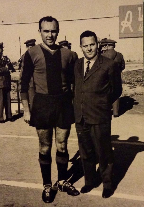 Foto del calciatore Goffredo Stabellini